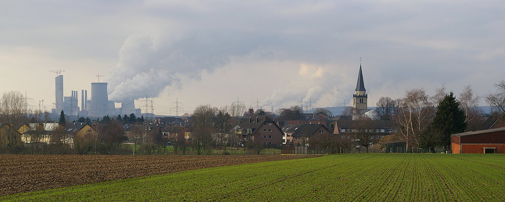 Ansicht von Rommerskirchen / Deutschland; Kraftwerk Neurath im Hintergrund.